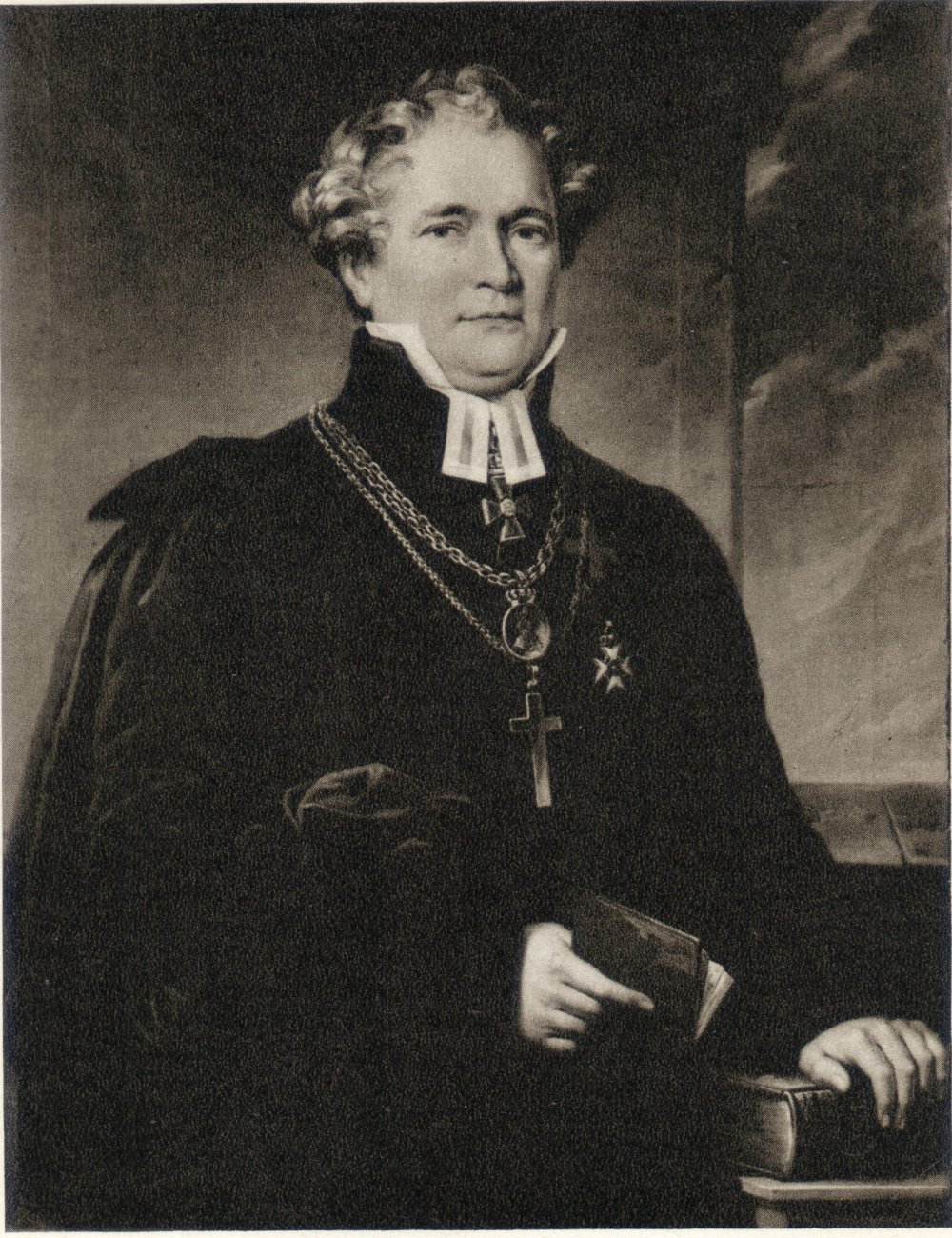 Johan Jacob Hedrén (1775-1861), biskop i Karlstad och Linköping